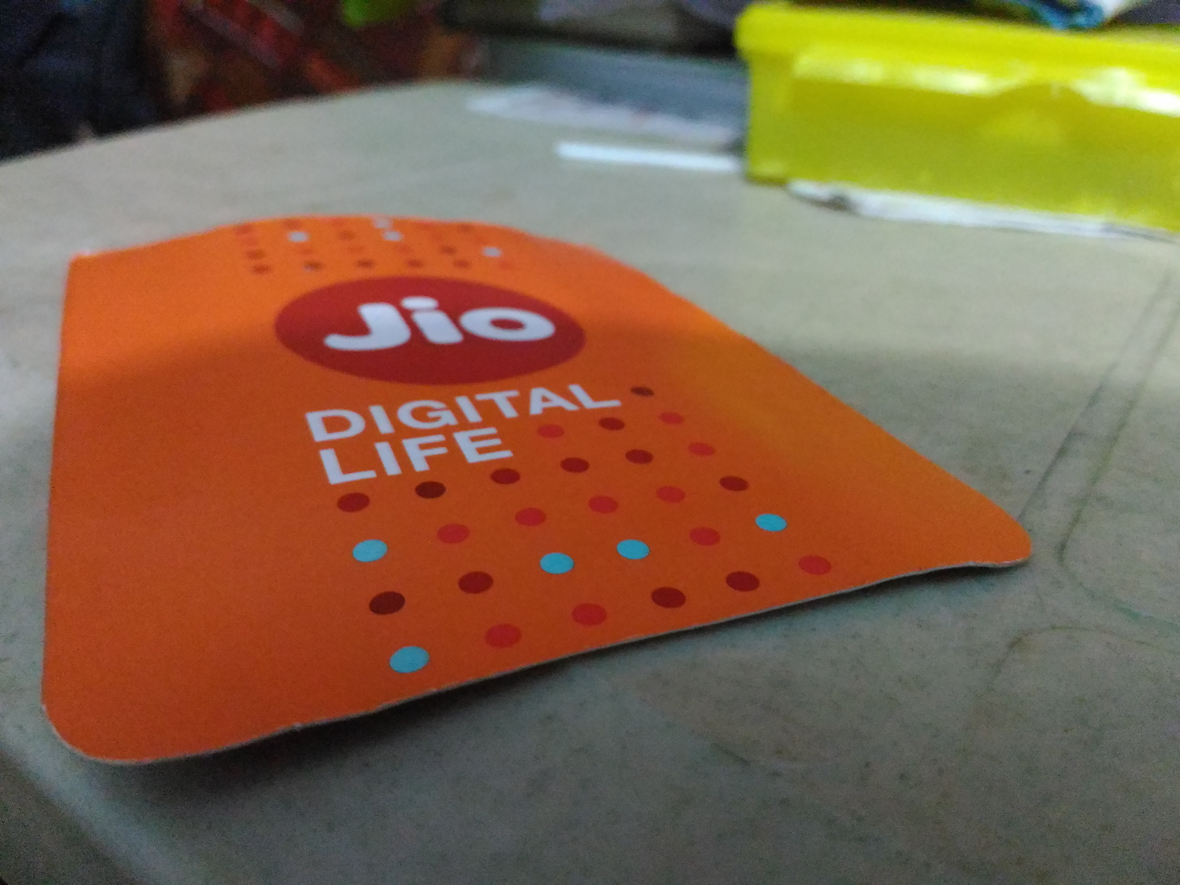 Reliance Jio